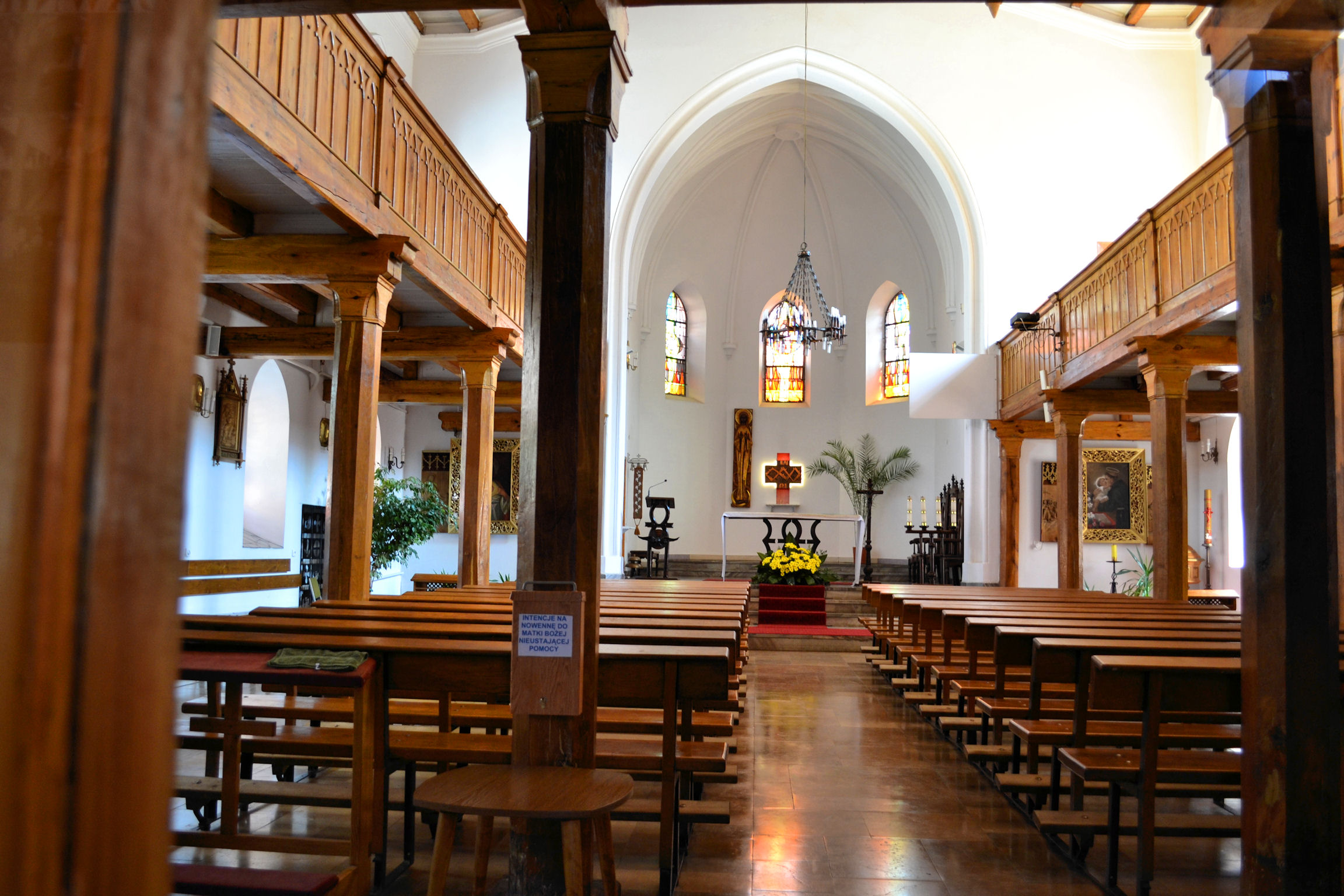 Kościół rektorski w Kołobrzegu